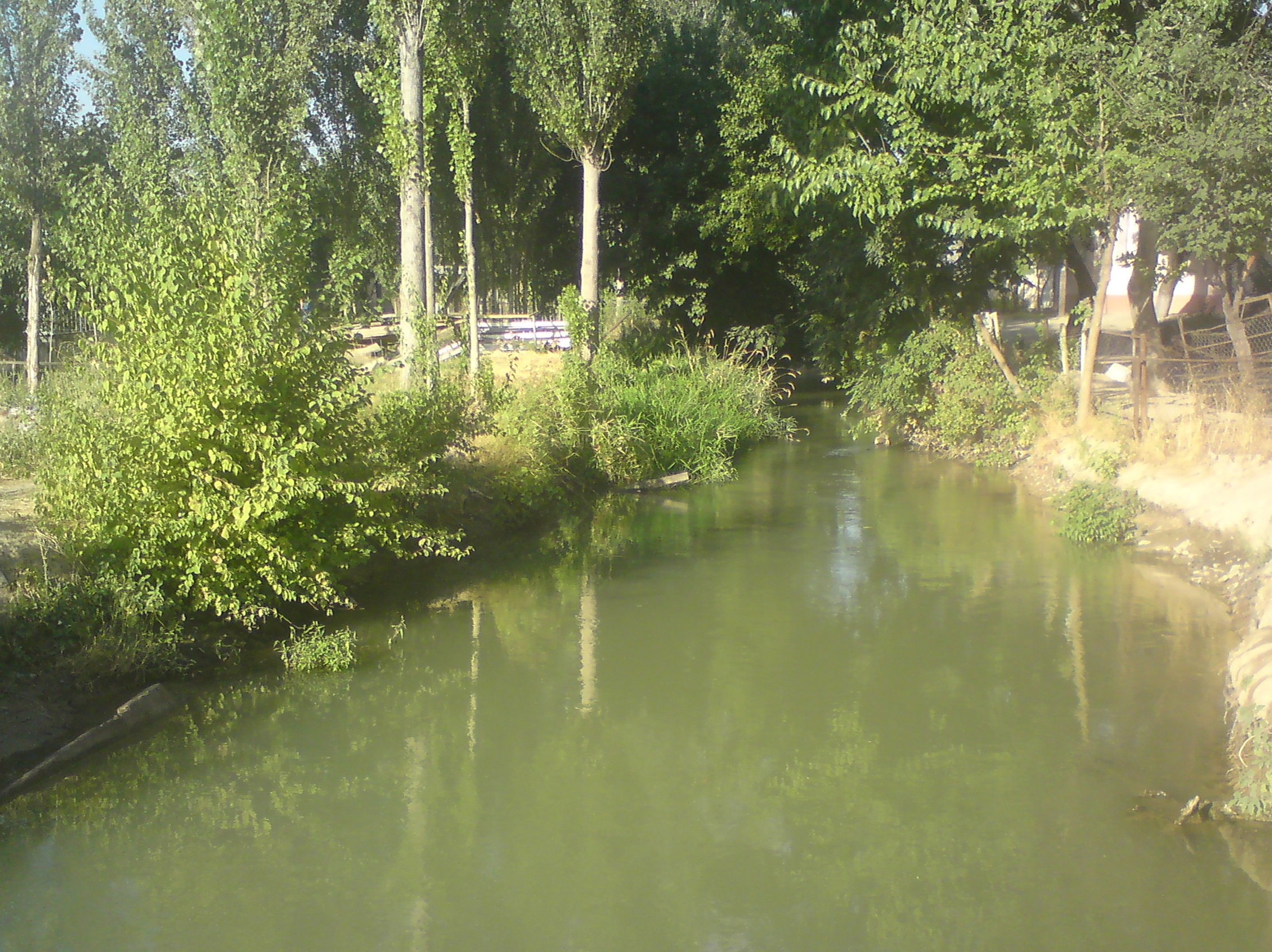 Канал Изза (Иззасай), отвод канала Анхор, город Ташкент